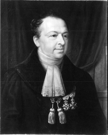 Porträt des Professors der Rechte Leopold August Warnkönig